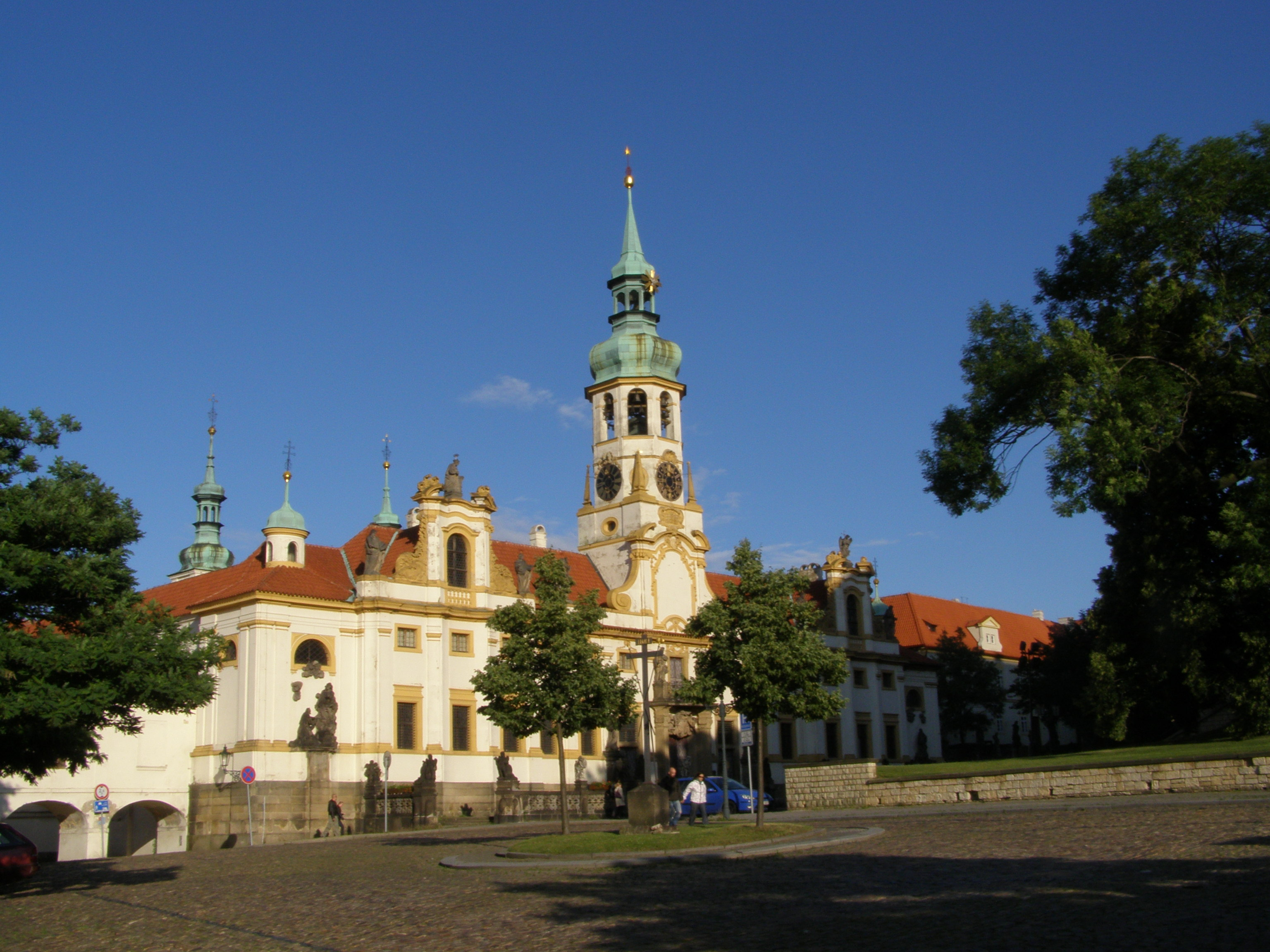 Praha, Hradčany, Loretánském náměstí a průčelí Lorety